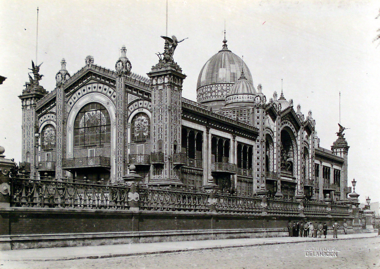 128. Pabellón Argentino de la Exposición Universal de París en Buenos Aires, 1910. Inventario 1303. General Archive of the Nation Native nameArchivo General de la Nación ArgentinaLocationBuenos Aires, ArgentinaCoordinates34° 36′ 17″ S, 58° 22′ 14″ W Established28 August 1821Web pageAGNAuthority control : Q2860529 ISNI: 0000 0001 2375 5869 LCCN: n82144709 WorldCat institution QS:P195,Q2860529 This file, was provided to Wikimedia Commonsthanks to an agreement between the General Archive of the Nation of Argentina and Wikimedia Argentina.